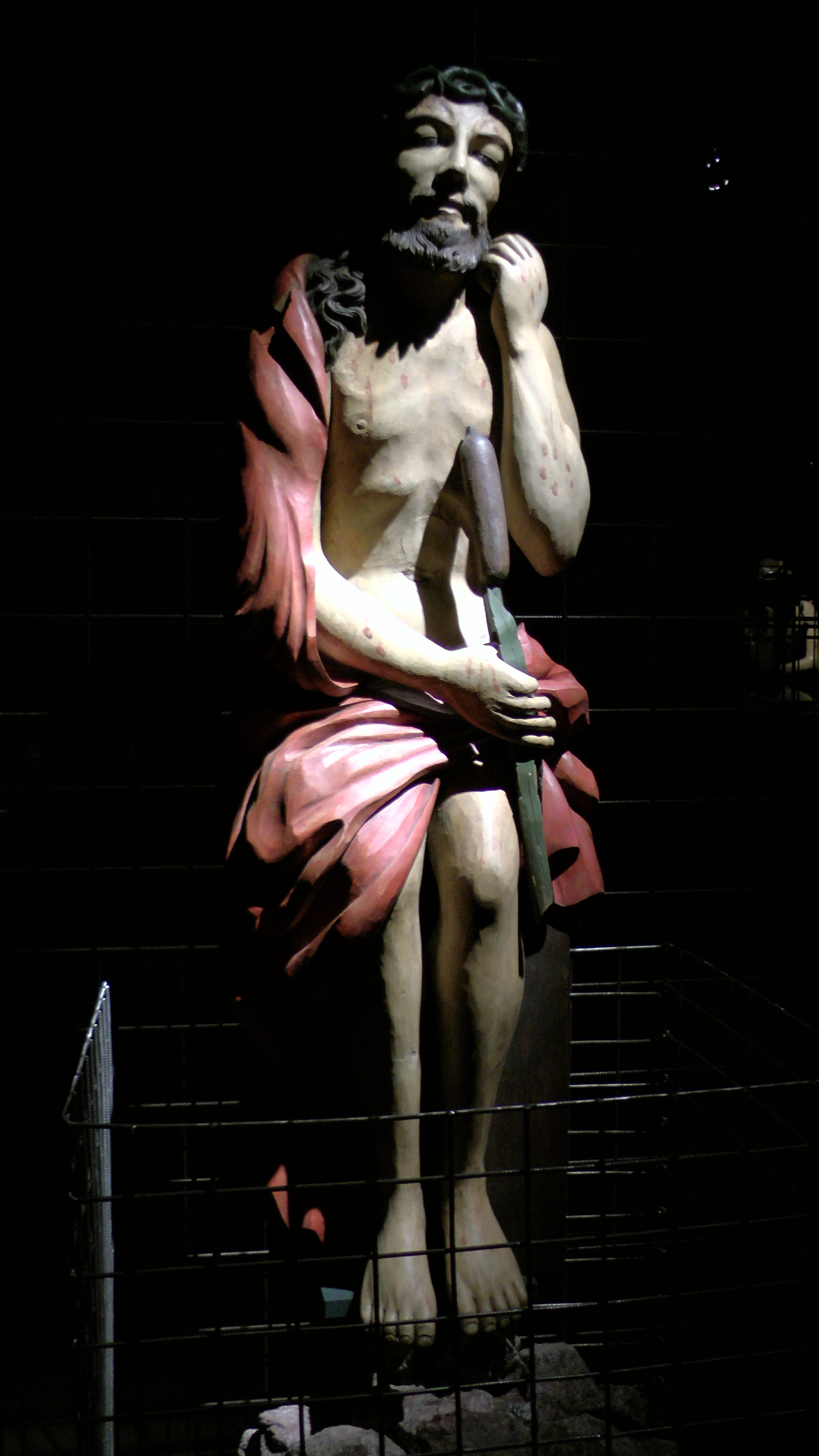 Христос в темнице. Рязанский государственный областной художественный музей, XIX век. Фотография сделана на выставке "Христос в темнице" в Санкт-Петербурге